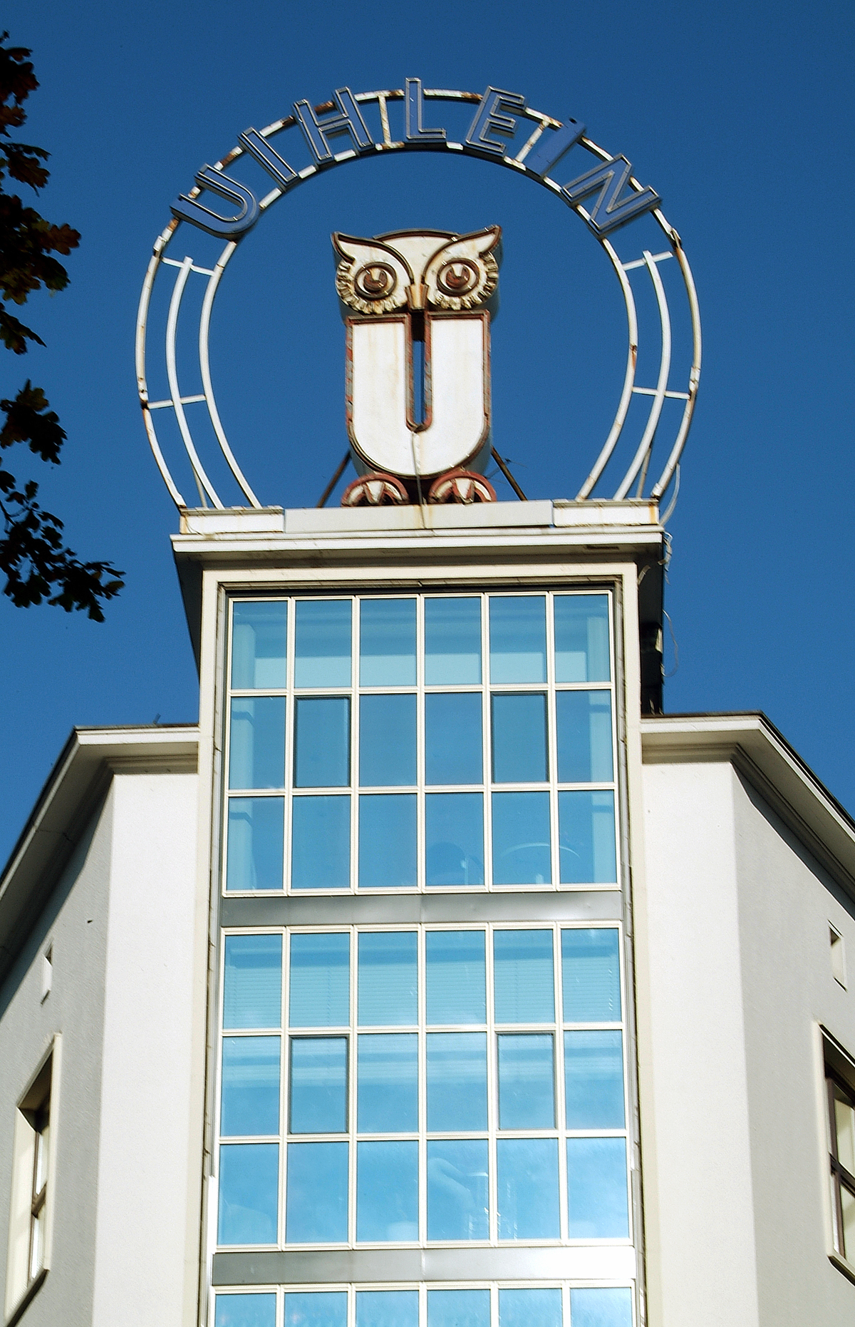 Firmenzeichen des Tapetenhauses Uihlein mit dem Treppenhaus (Ausschnitt) in der Andreaestraße 1